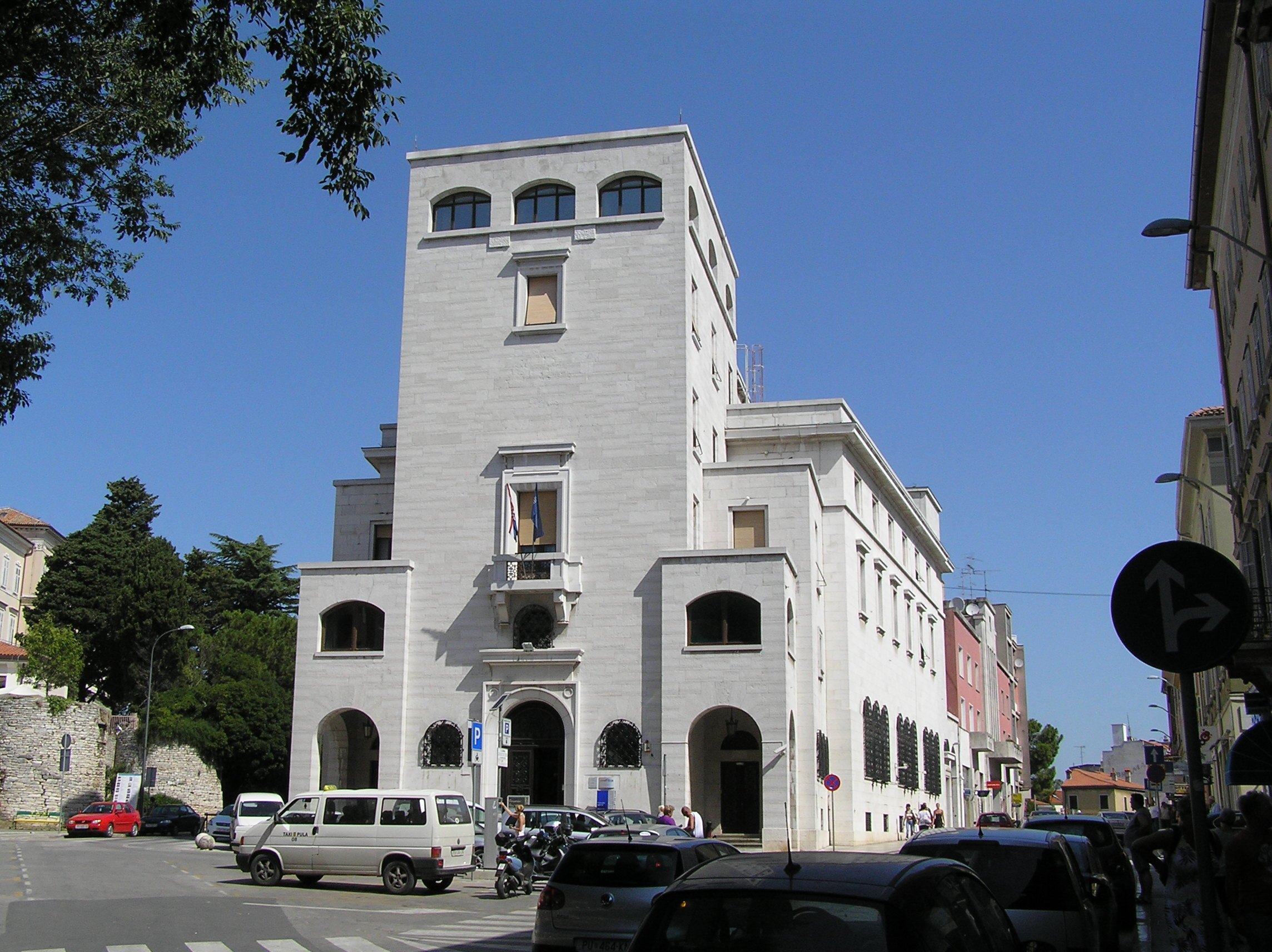 Arhitektura u Puli iz razdoblja talijanske uprave (1918-1943)